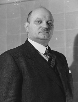 Alojzy Adamczyk